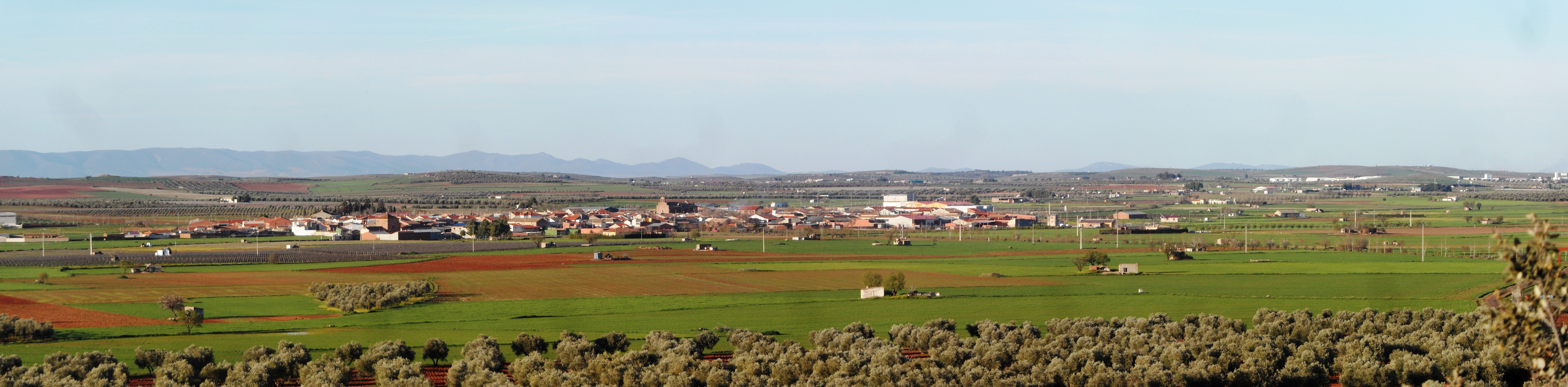 Vista panorámica de Valenzuela de Calatrava desde la ermita de San Isidro.